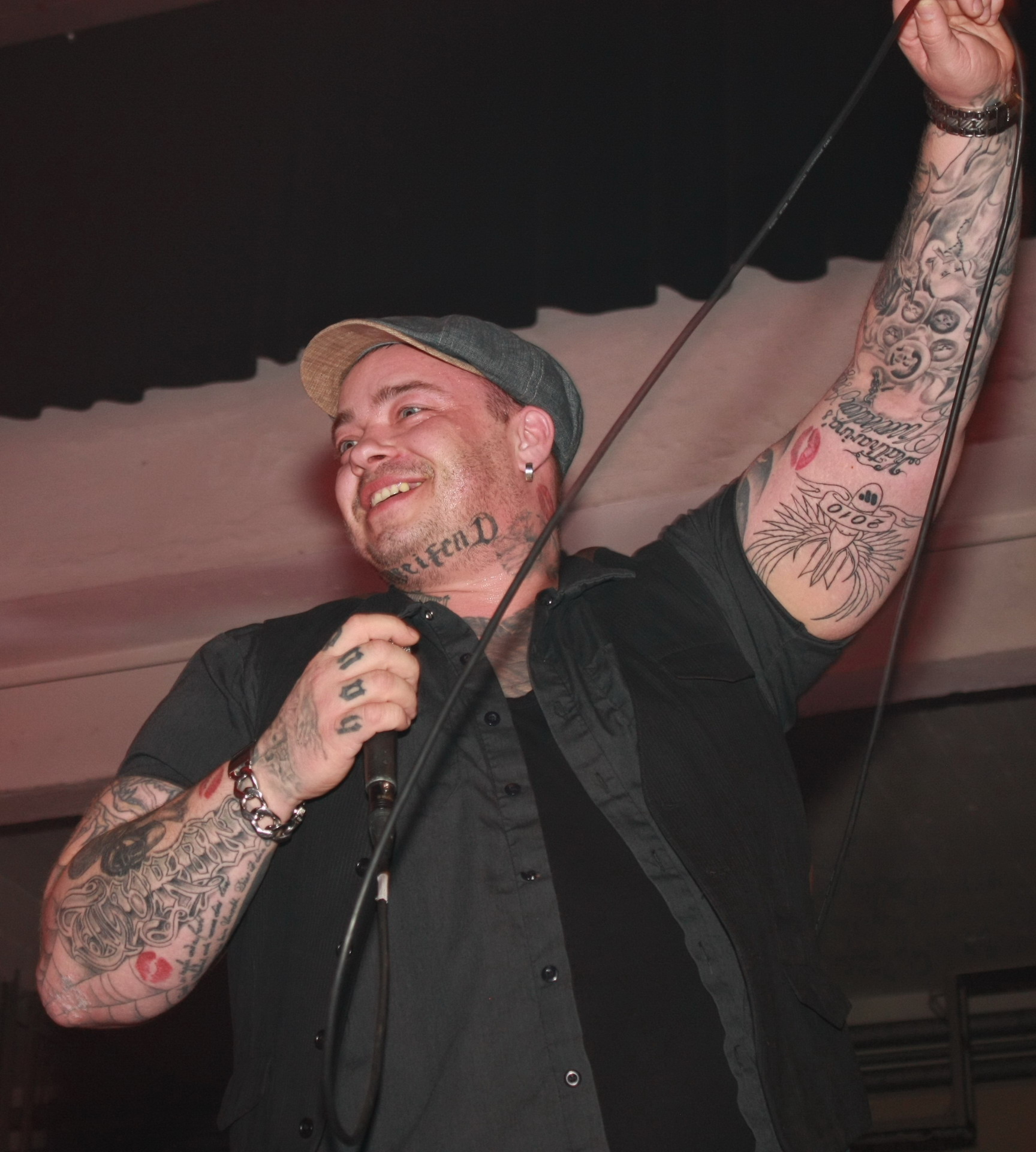 Sven Gillert alias Kante von Haudegen Live in Magdeburg am 2012-03-10 by NicoJenner